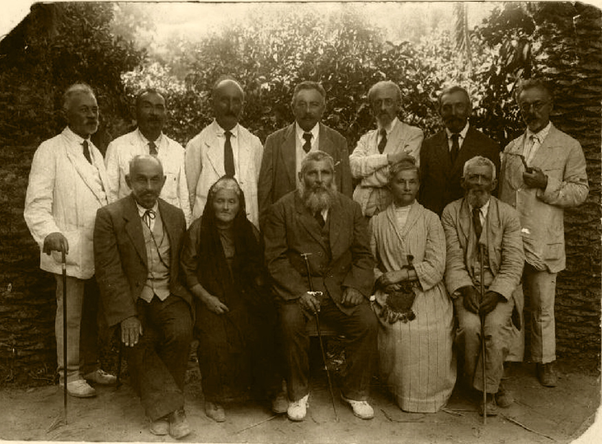 מפגש בין ביל"ויי גדרה וביל"ויי ראשל"צ בגן הברון בראשון לציון. עומדים מימין לשמאל: דר' חיים חיסין, צבי בן-יעקב הורוביץ, מנשה מאירוביץ, דב אריאל לייבוביץ', יואל דרובין, בנימין פוקס, שמשון בלקינד. יושבים מימין לשמאל: יעקב שלמה חזנוב, פאני פיינברג, יהודה צלליכין, חסיה צלליכין, אליהו סברדלוב.